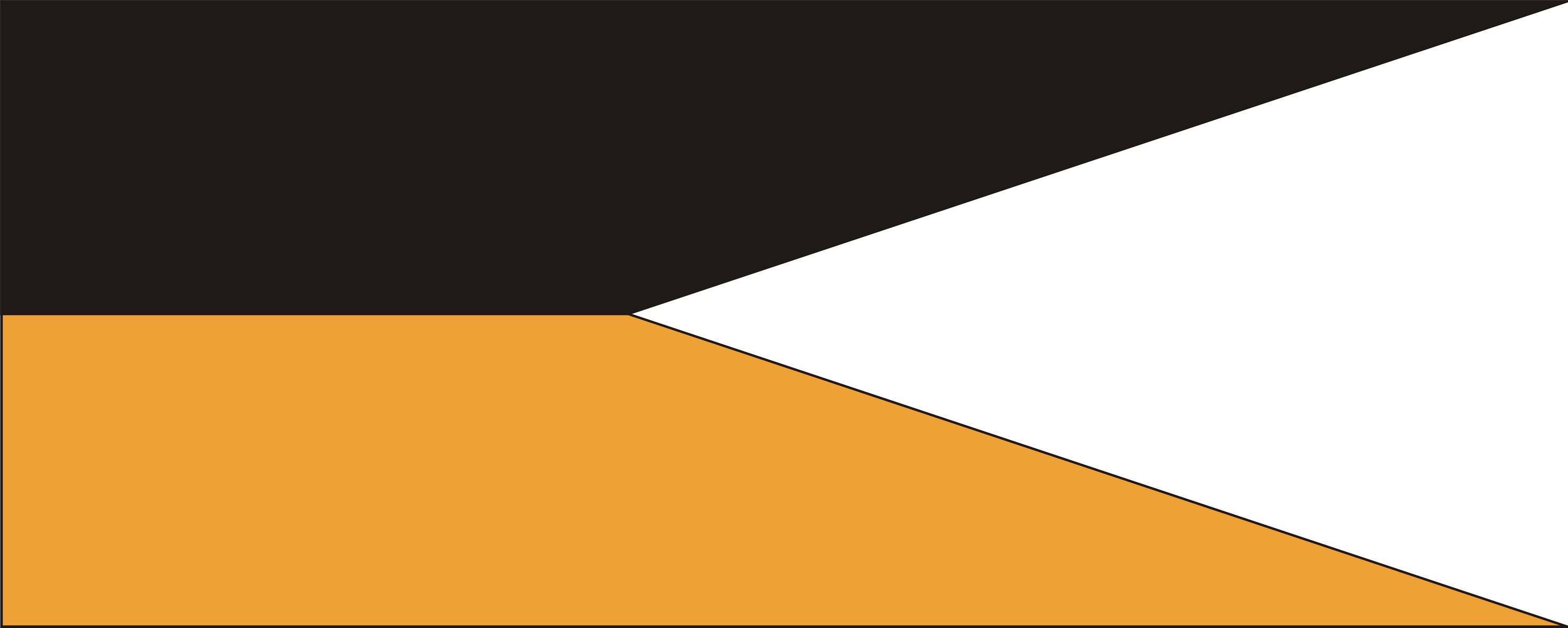 1. Barwy - proporczyk 10 Brygady Kawalerii Pancernej PSZ na Zachodzie. 2. 0d 1927 roku barwy samochodów pancernych WP II RP